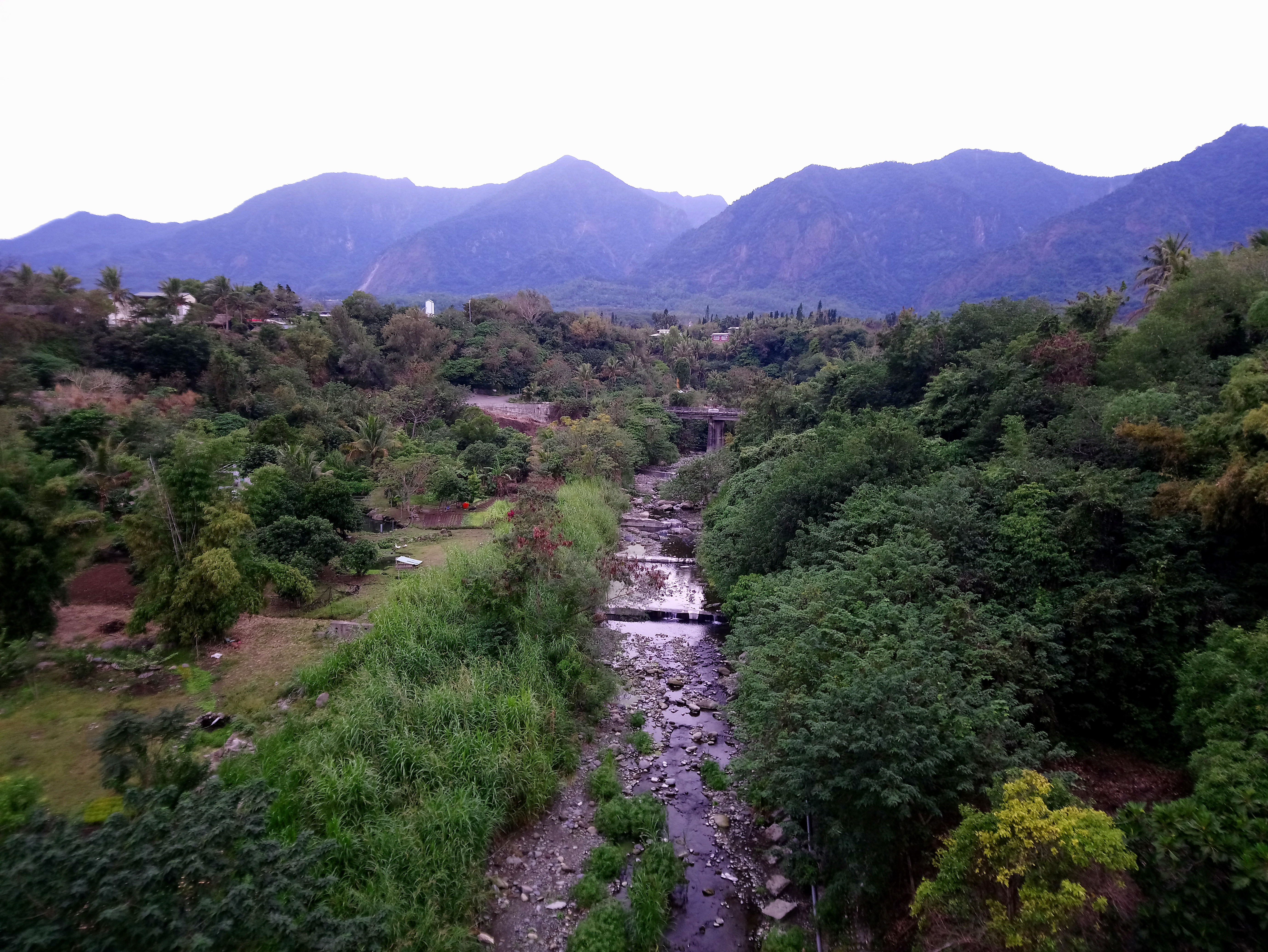 臺灣臺東縣都蘭溪